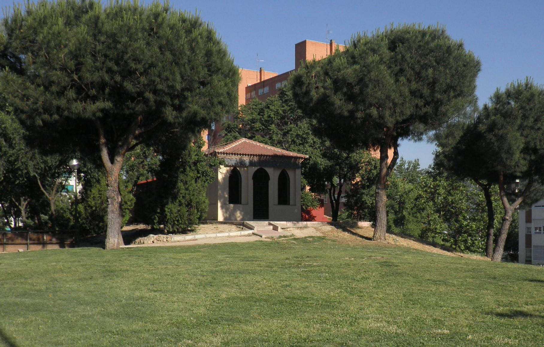 Foto de la ermita y parque del viejo cementerio.